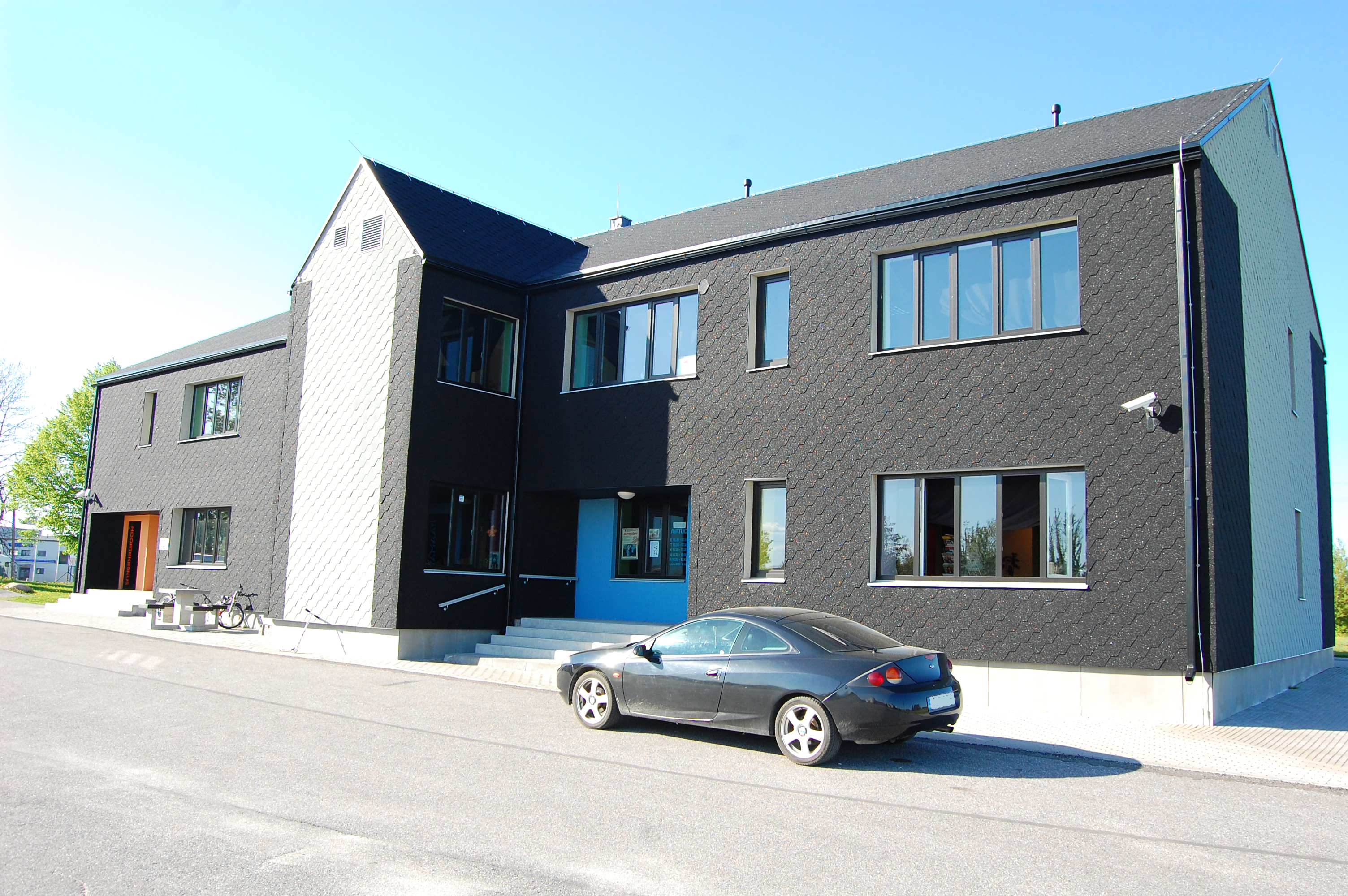 Sauga raamatukogu ja noortekeskus 2012. a maikuus